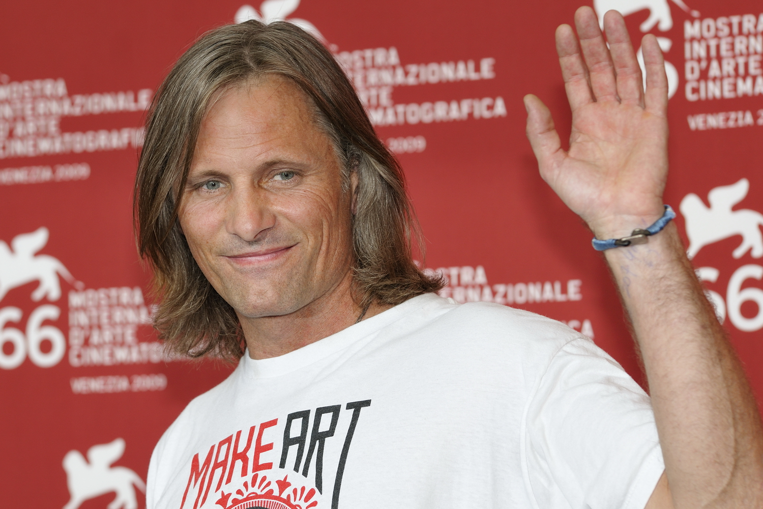 66�me Festival du Cin�ma de Venise (Mostra), 2�me jour (03/09/2009) Photocall avec Viggo Mortensen pour le film : The Road